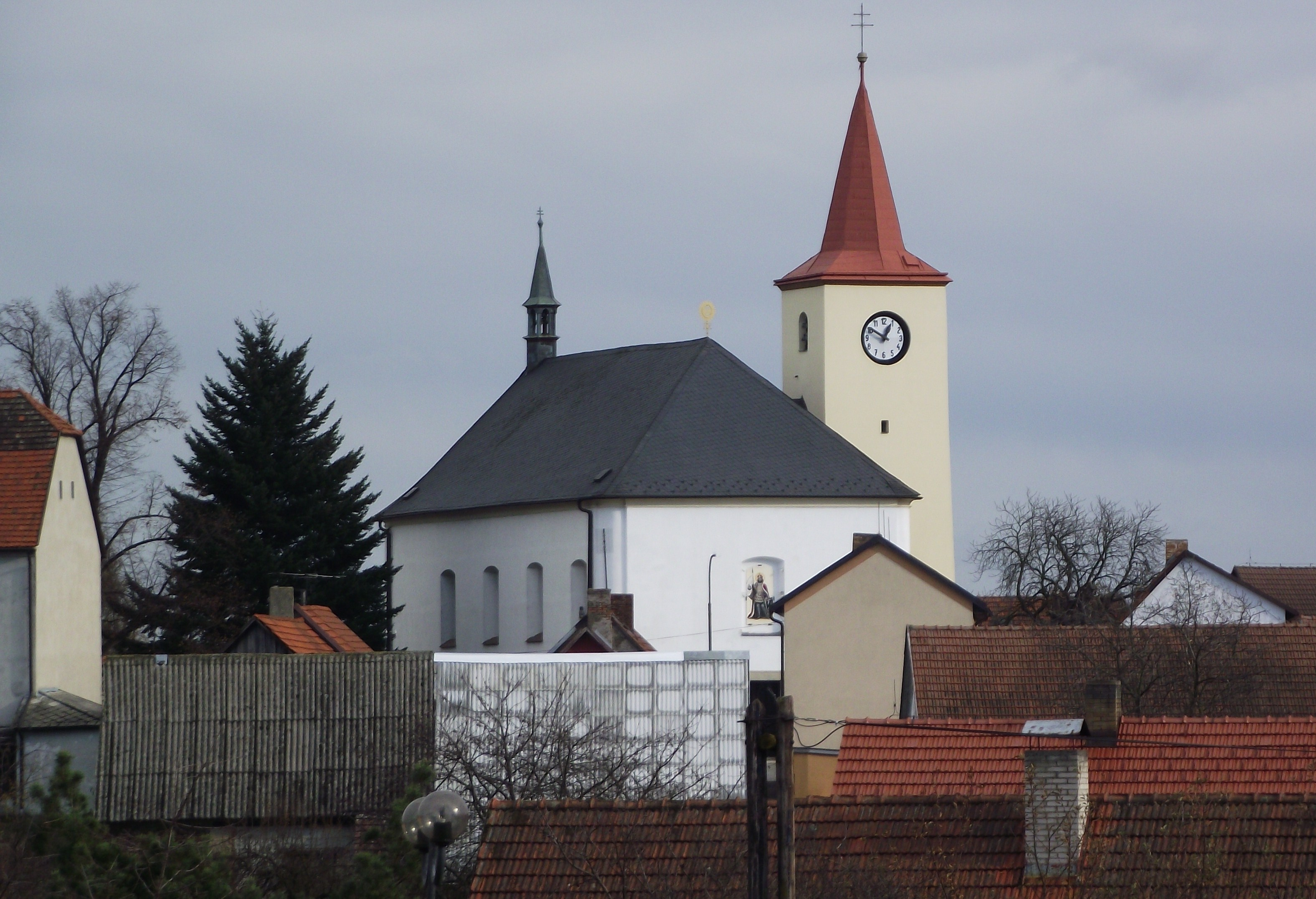 Kostel svatého Václava na návsi v Lukavci, okres Pelhřimov.